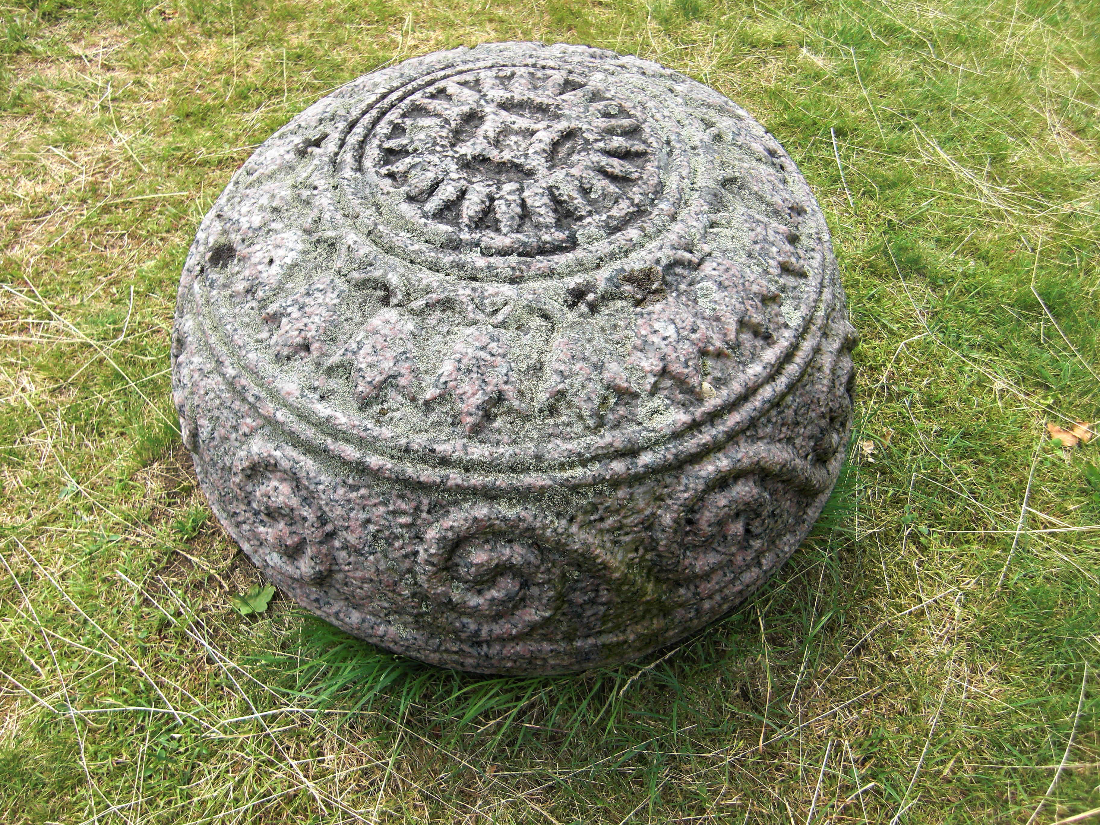 Inglinge hög (Raä-nr Östra Torsås 1:1) strax väster om Ingelstad, Östra Torsås socken, Konga härad, Växjö kommun, Värend, Kronobergs län, Småland. Närbild på en kopia av gravklotet.